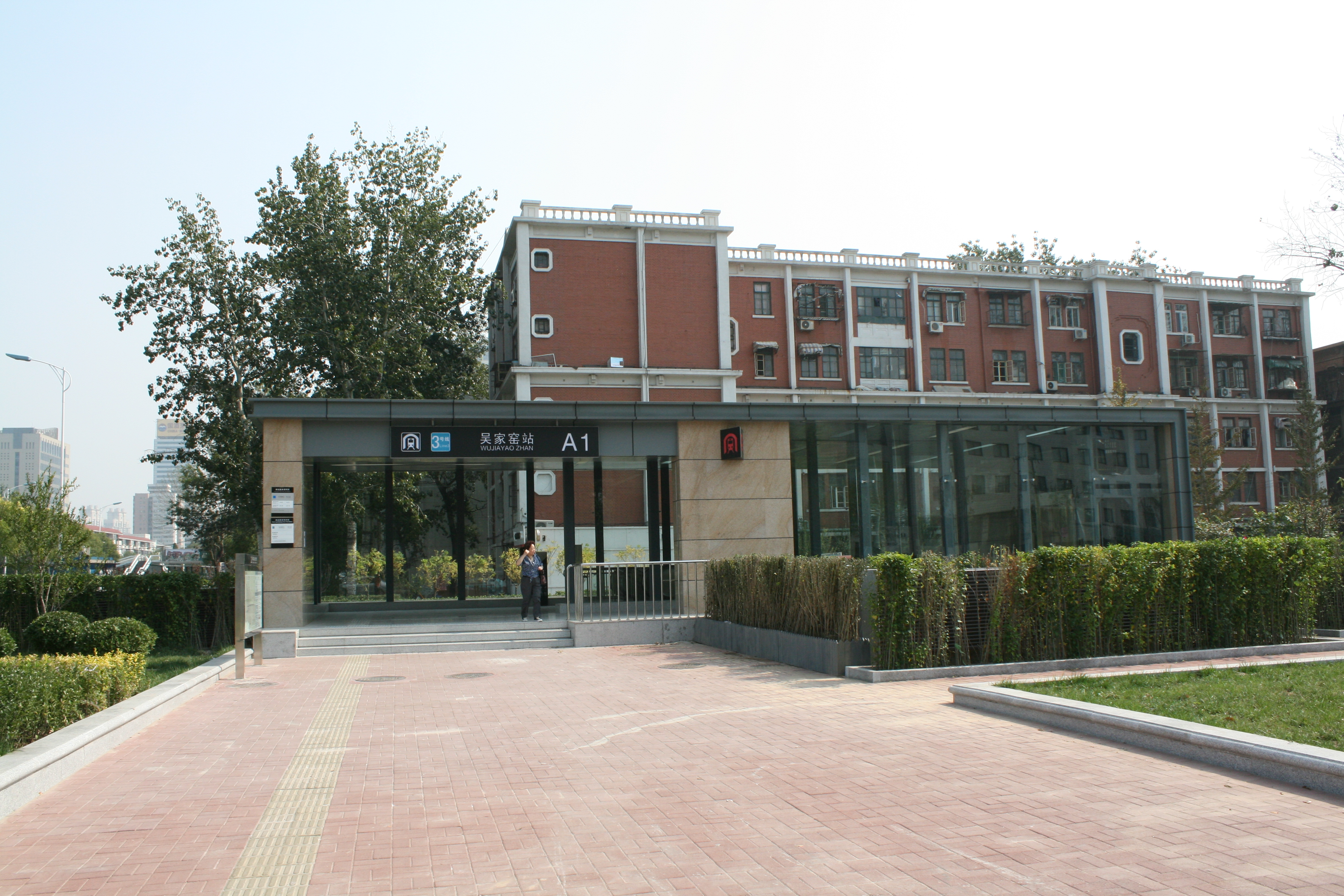 天津地鐵三號線吳家窯站A1出口 0002